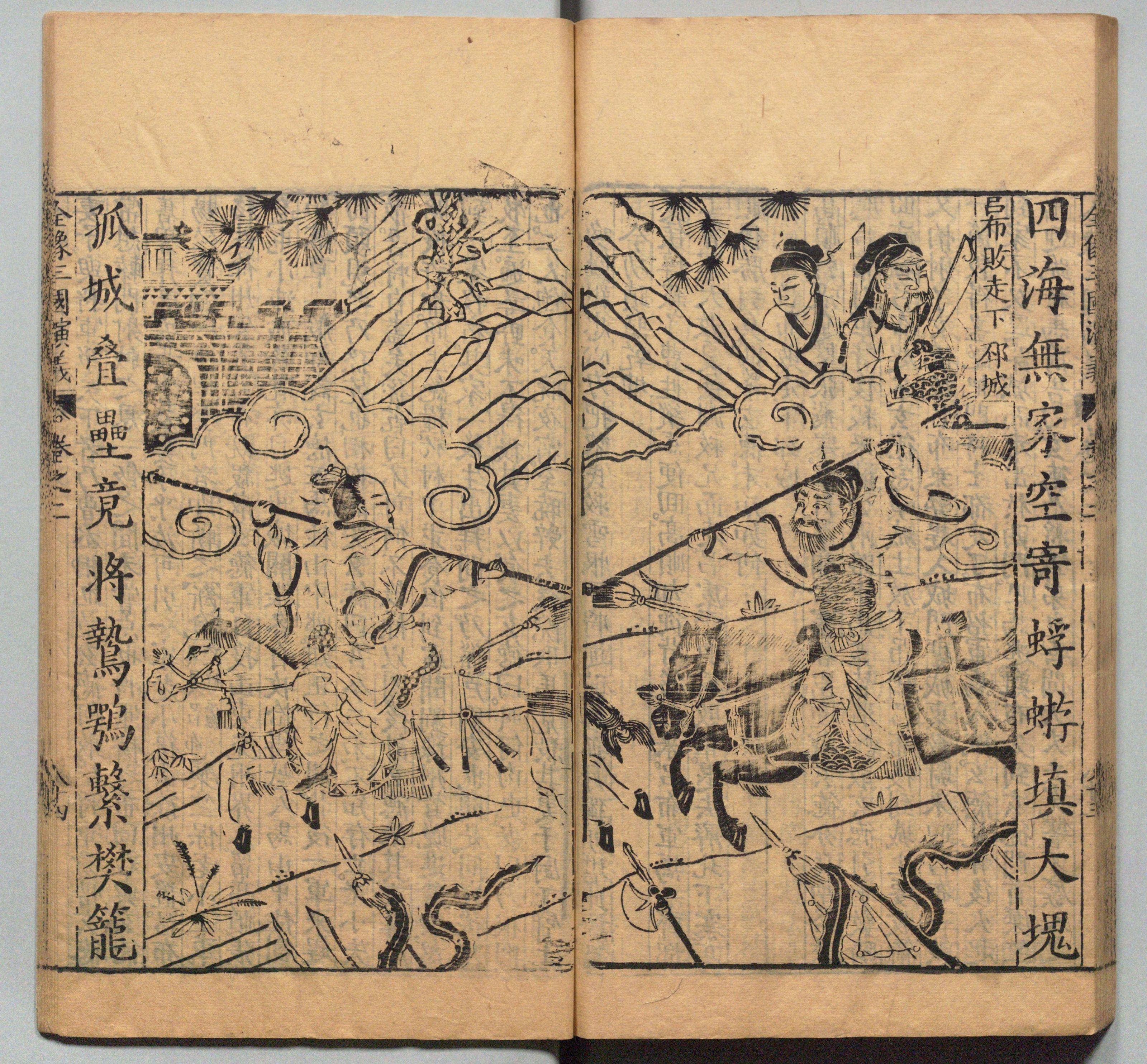 《新刊校正古本大字音释三国志通俗演义》 明万历十九年书林周曰校刊本